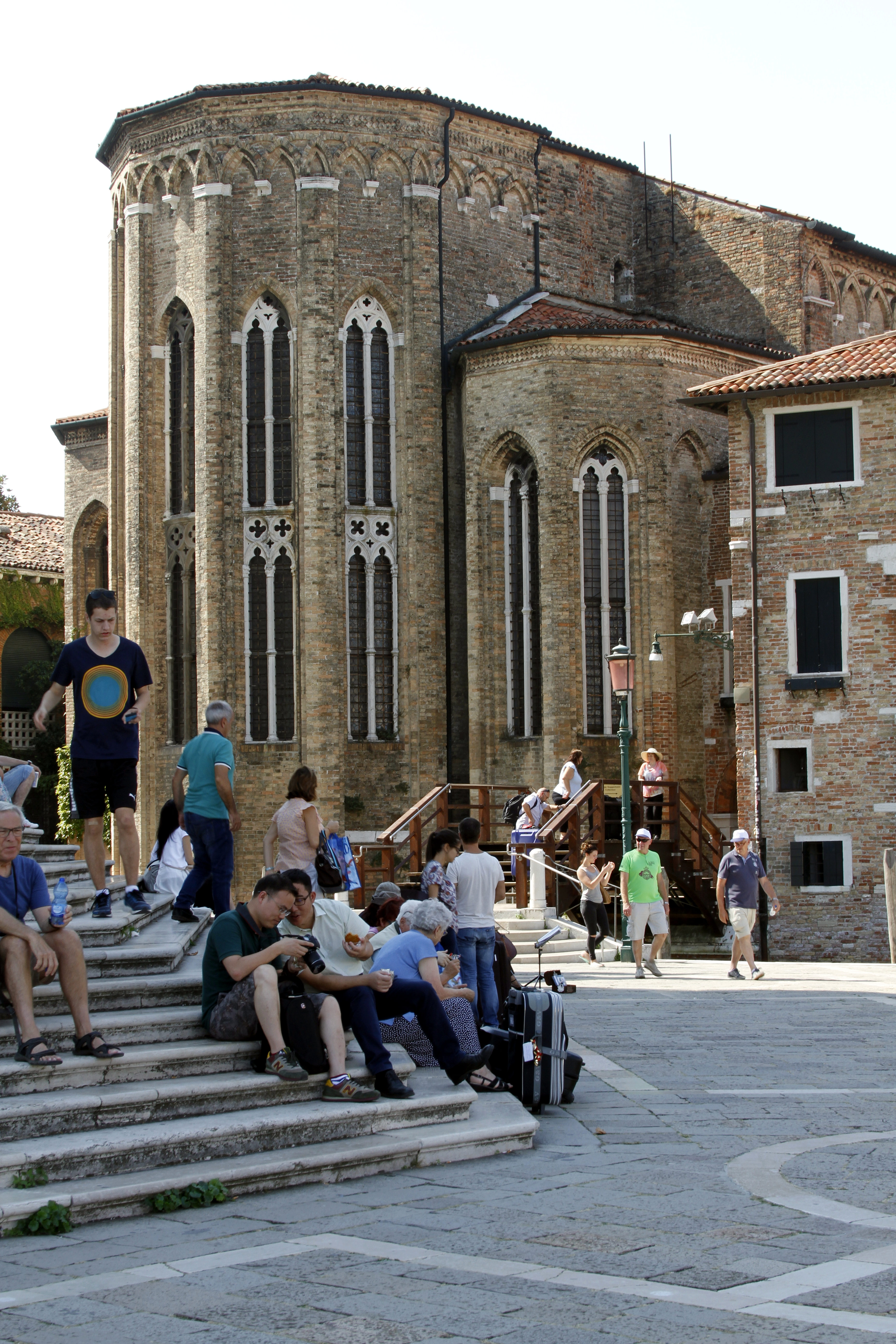 San Gregorio, Venice